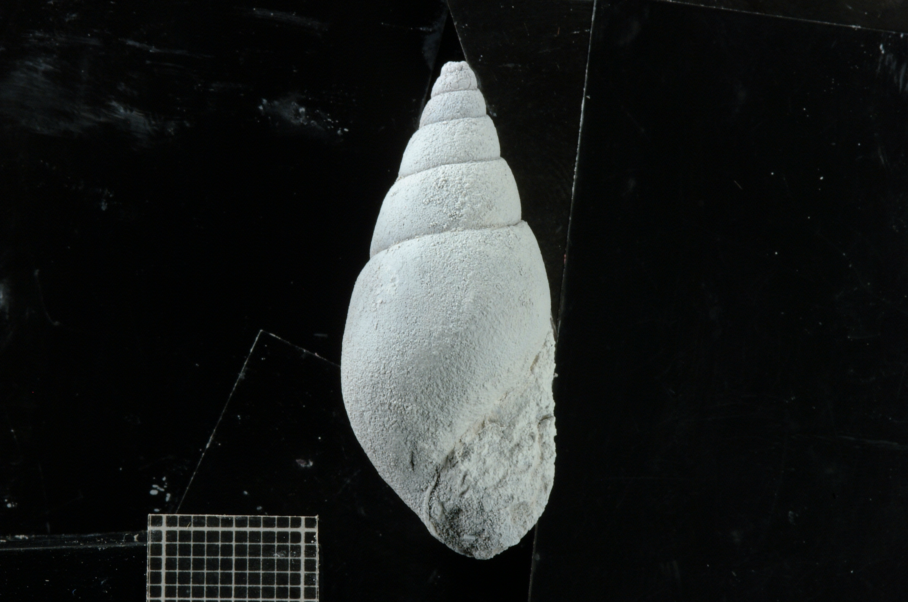 Ejemplar del gastrópodo marino fósil Poasia sp.